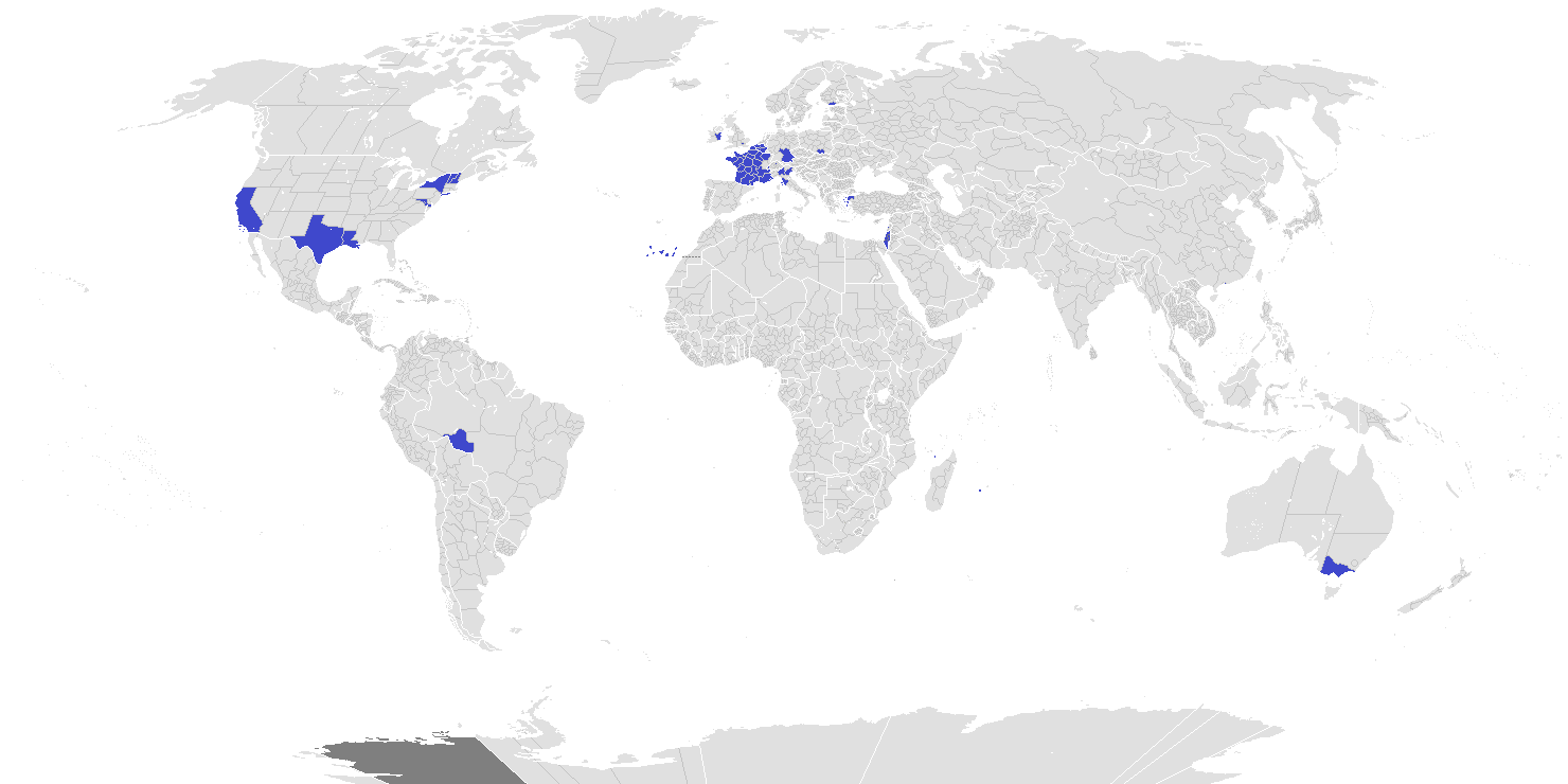 Cette carte montre les territoires régionaux visités au moins une fois par les journalistes de l'émission Quotidien de Yann Barthès, au cours de la saison 4 (2019-2020).